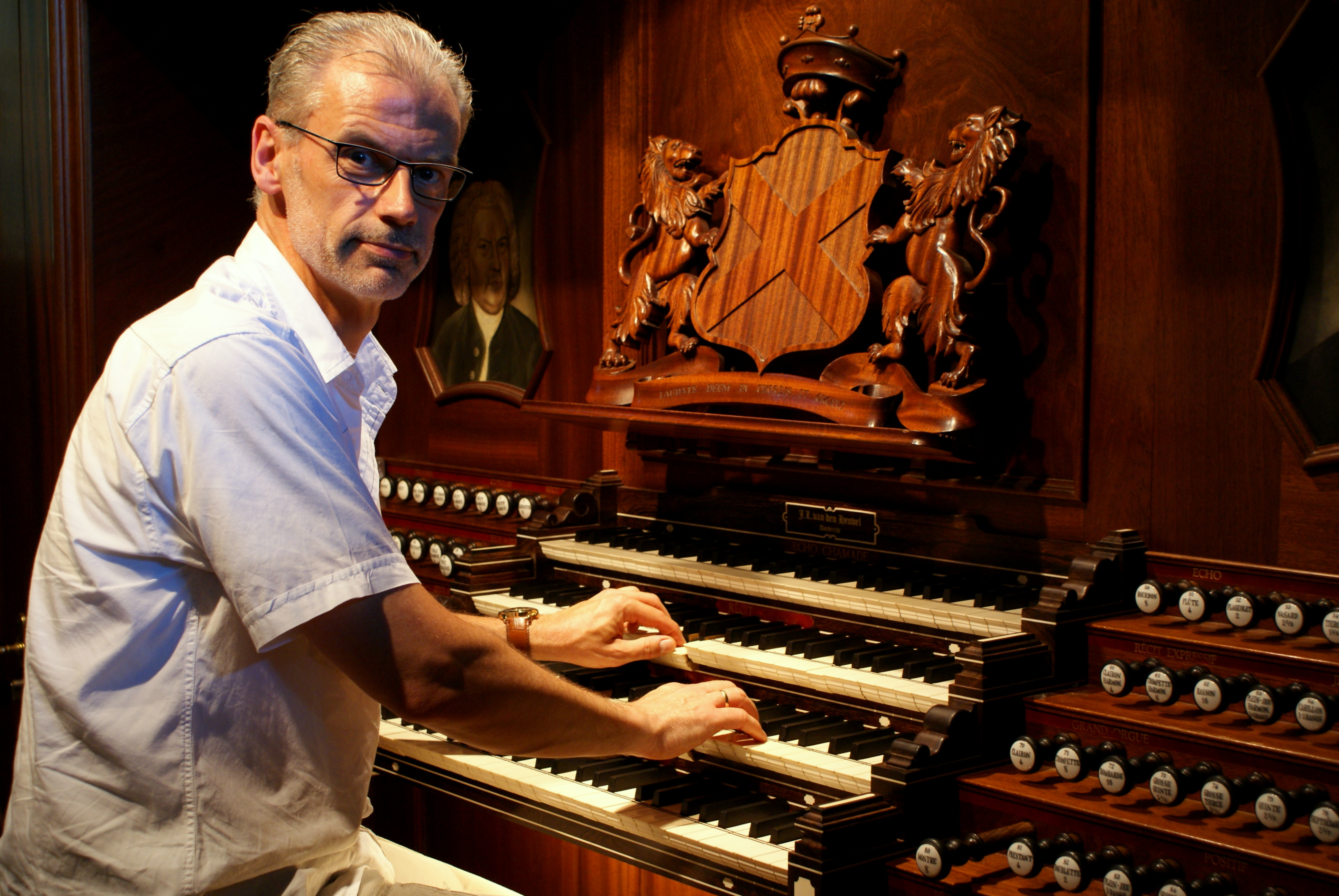 Arjan Breukhoven speelt in Katwijk op het orgel. SONY DSC